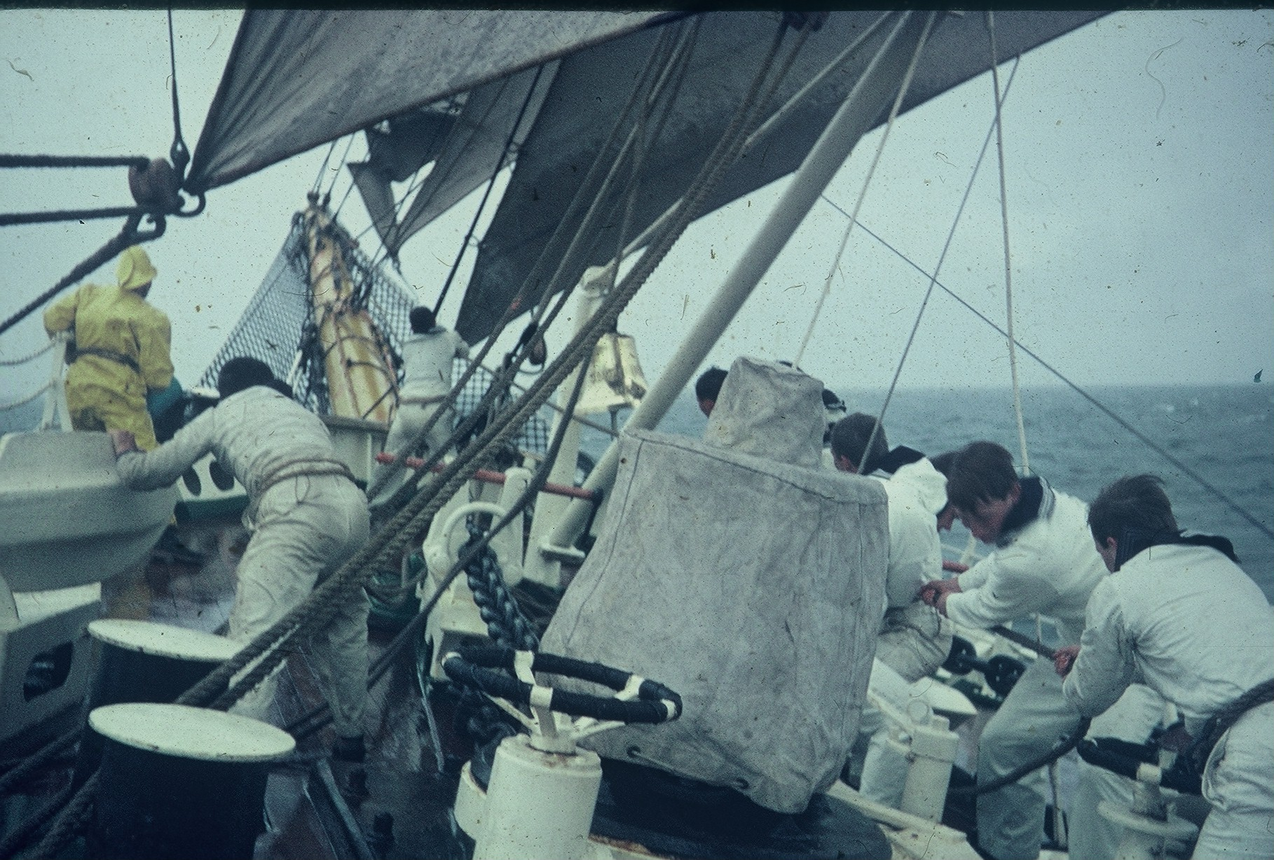 Bergen des Außenklüvers (2. Vorsegels) auf der Gorch Fock (1958)